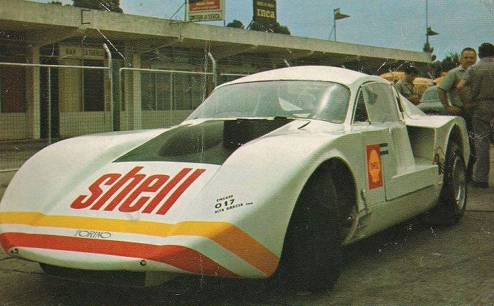 Romero-Tornado (Matetón) de Nasif Estéfano de la temporada 1969 de Sport Prototipo Argentino.